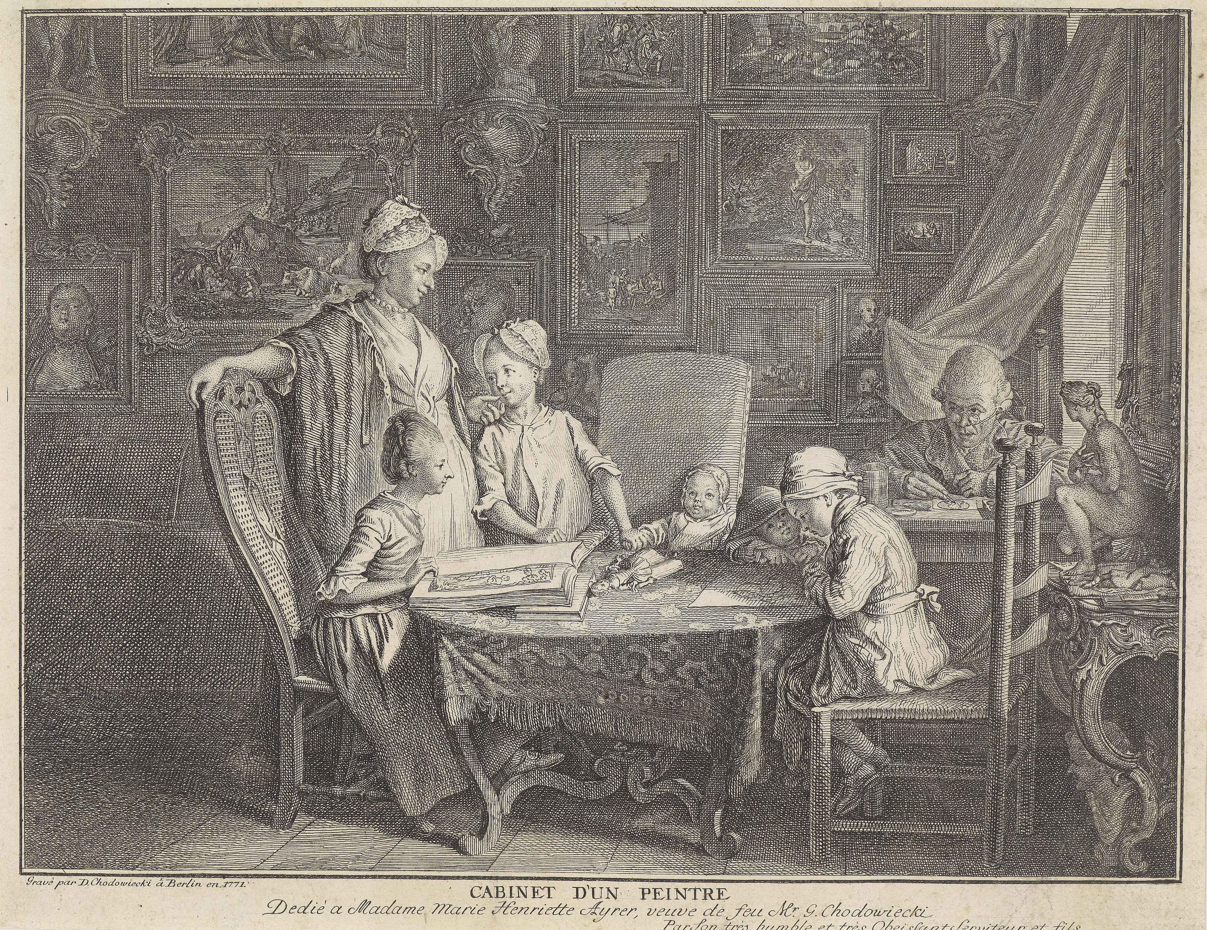 Cabinet d'un peintre, Radierung, in der Platte signiert und datiert Gravé par D. Chodowiecki á Berlin en 1771, 17,8 x 22,8 cm